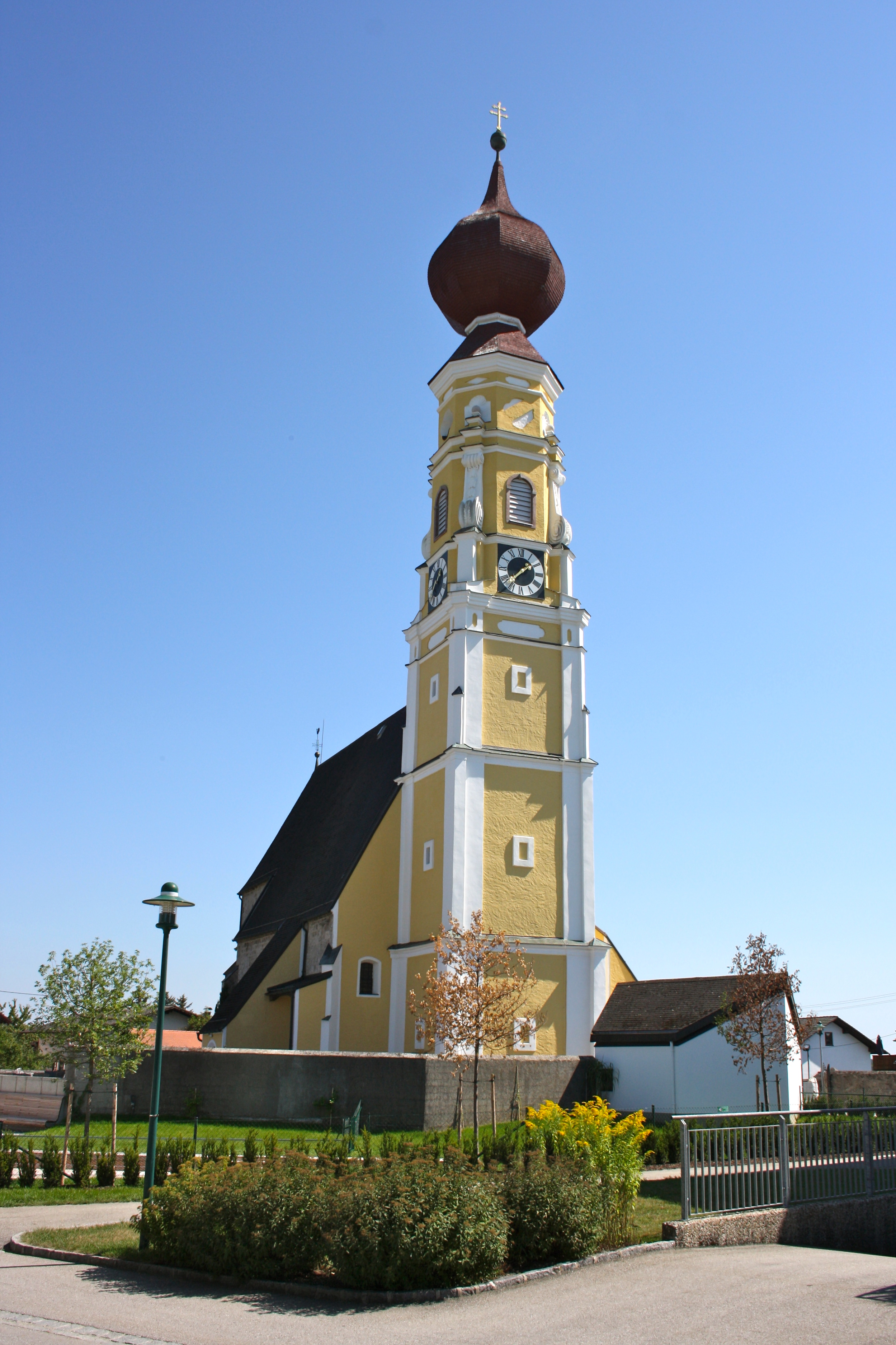 Kath. Pfarrkirche hl. Martin und Friedhof mit Ummauerung, Torbau und Kriegerdenkmal